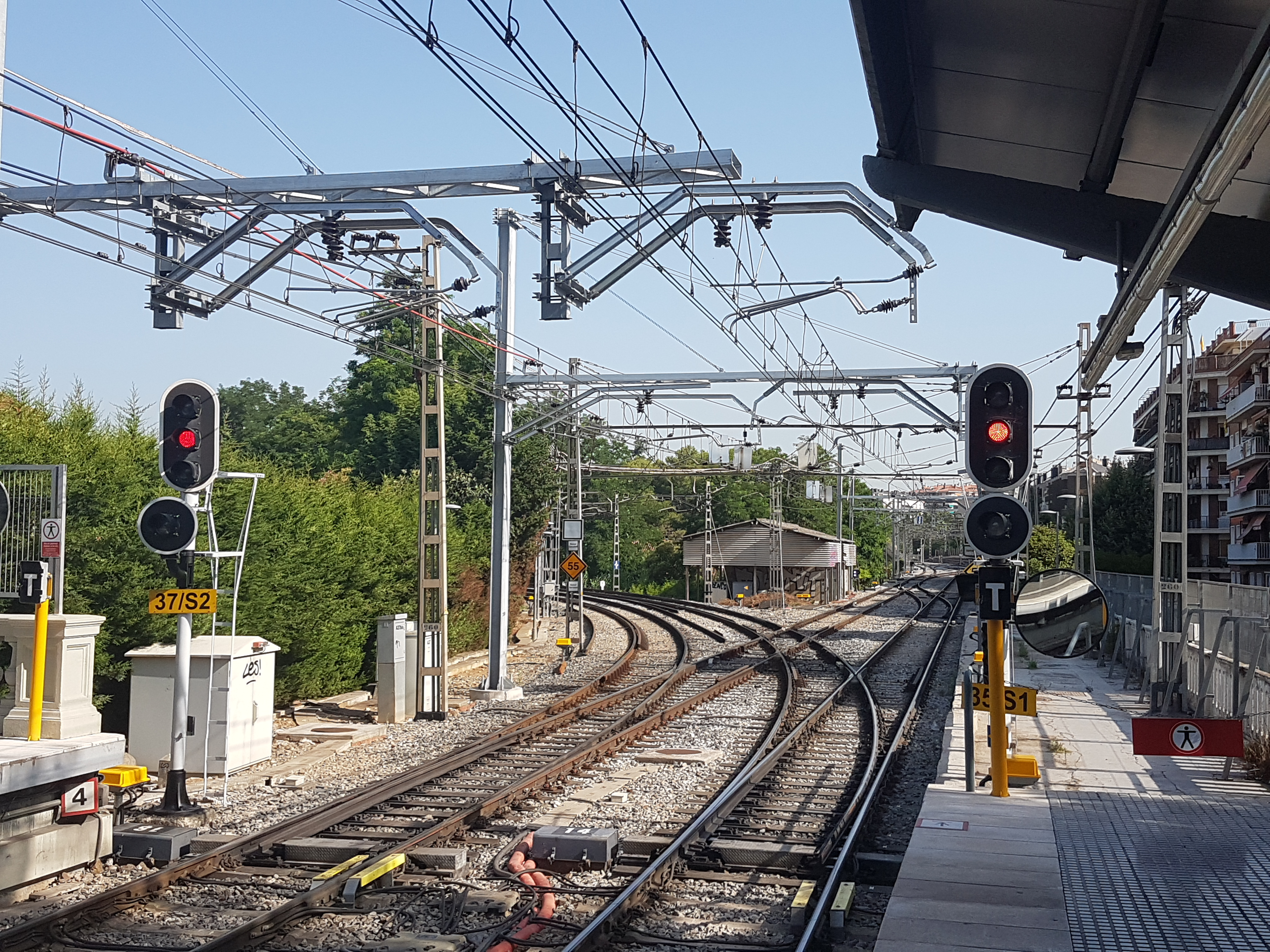 Senyals de sortida de l'estació de Sant Cugat i la bifurcació cap a Sabadell (a la dreta) i a Terrassa (a l'esquerra)